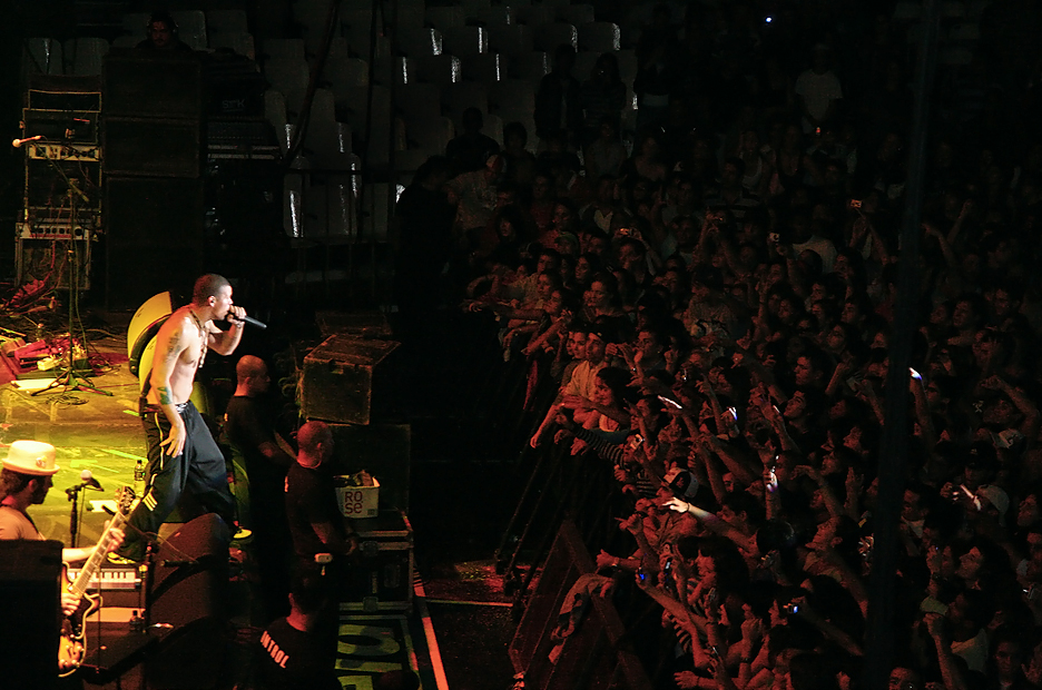 Calle 13 en Montevideo. Palacio Peñarol. La verdad sin el tele no pude hacer mucho y las luces no ayudaron que digamos, poca ambientación sobre el escenario.